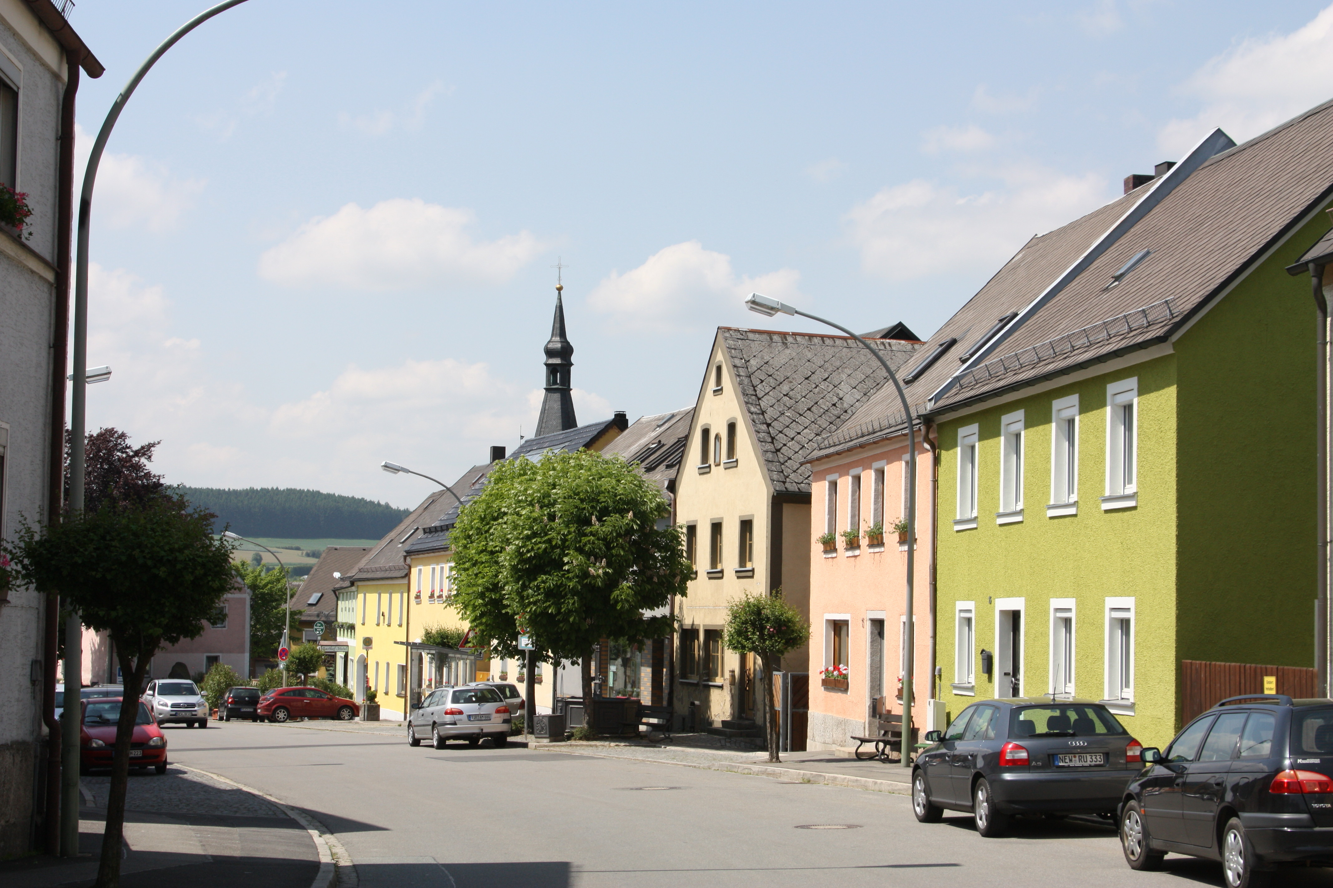 Windischeschenbach OT Neuhaus